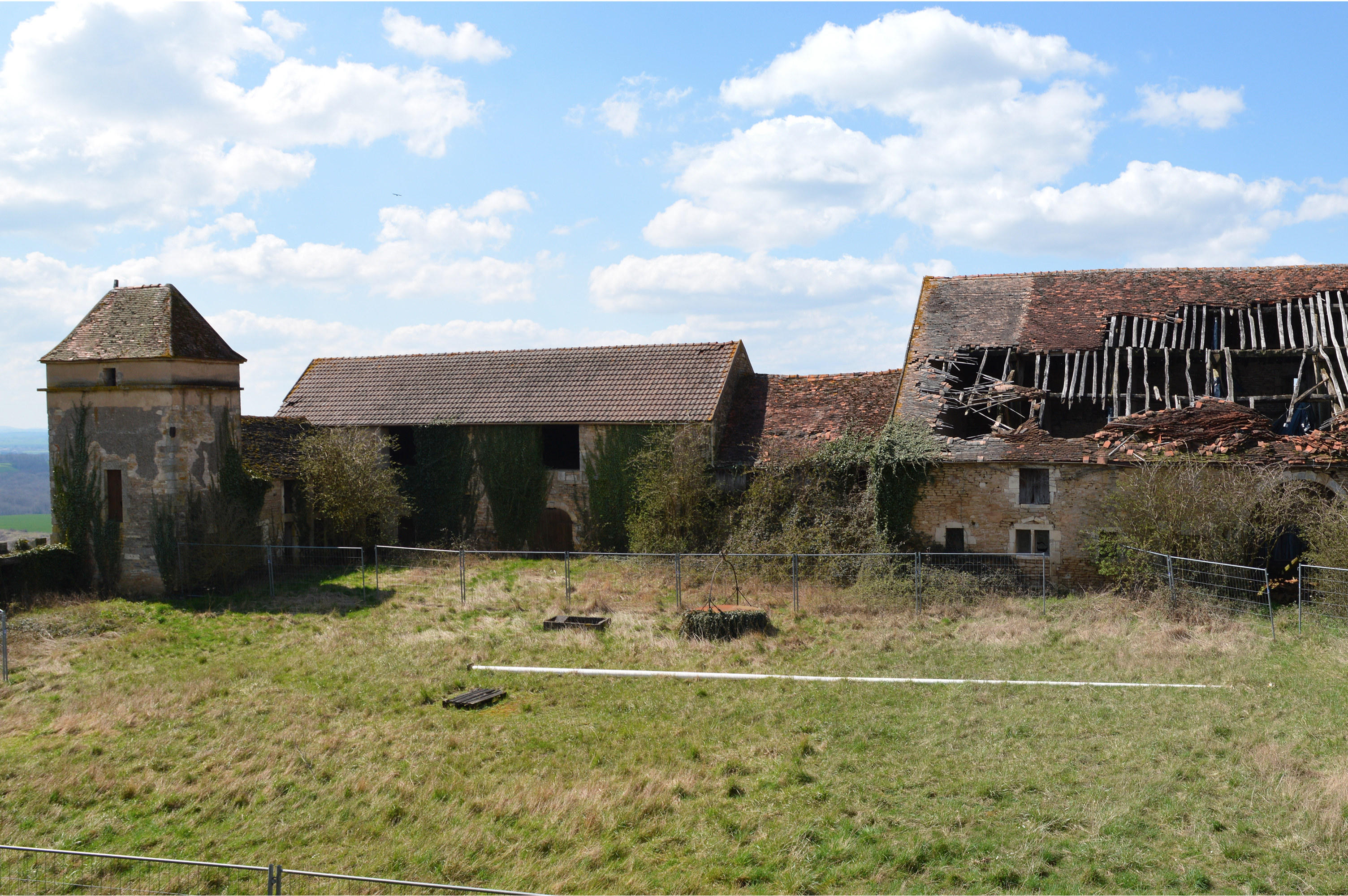 Prise de vue des bâtiments agricoles du château de Pisy constituants la façade ouest.